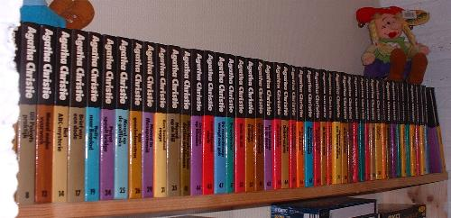 Foto van de Accolade reeks (niet compleet).